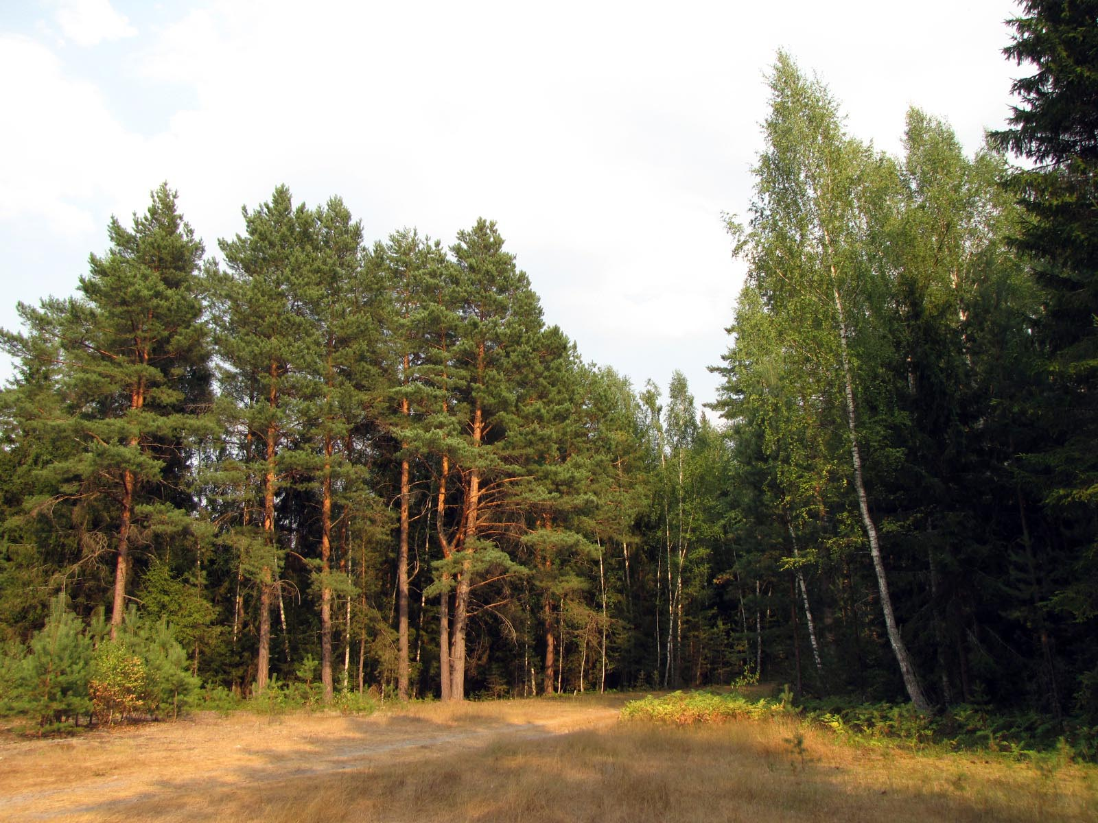 Ryazan Oblast Kolesnikovo